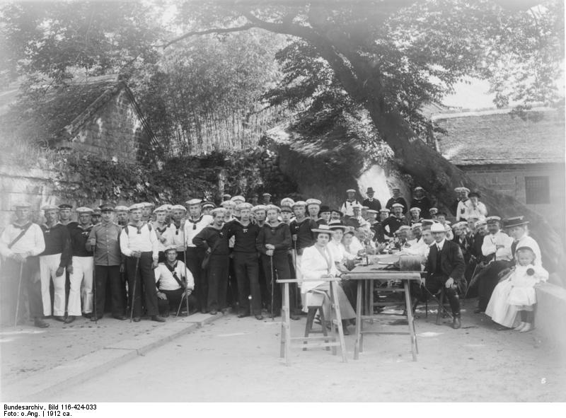 China, Tsingtau China, Tsingtau um 1912 [China, Tsingtau.-Gruppenbild - Matrosen mit Damen [Fotoalbum: Bilder aus China, von Ob.Matr.Artl. Quinten; Bem.: Originaltitel z.T. inkorrekt